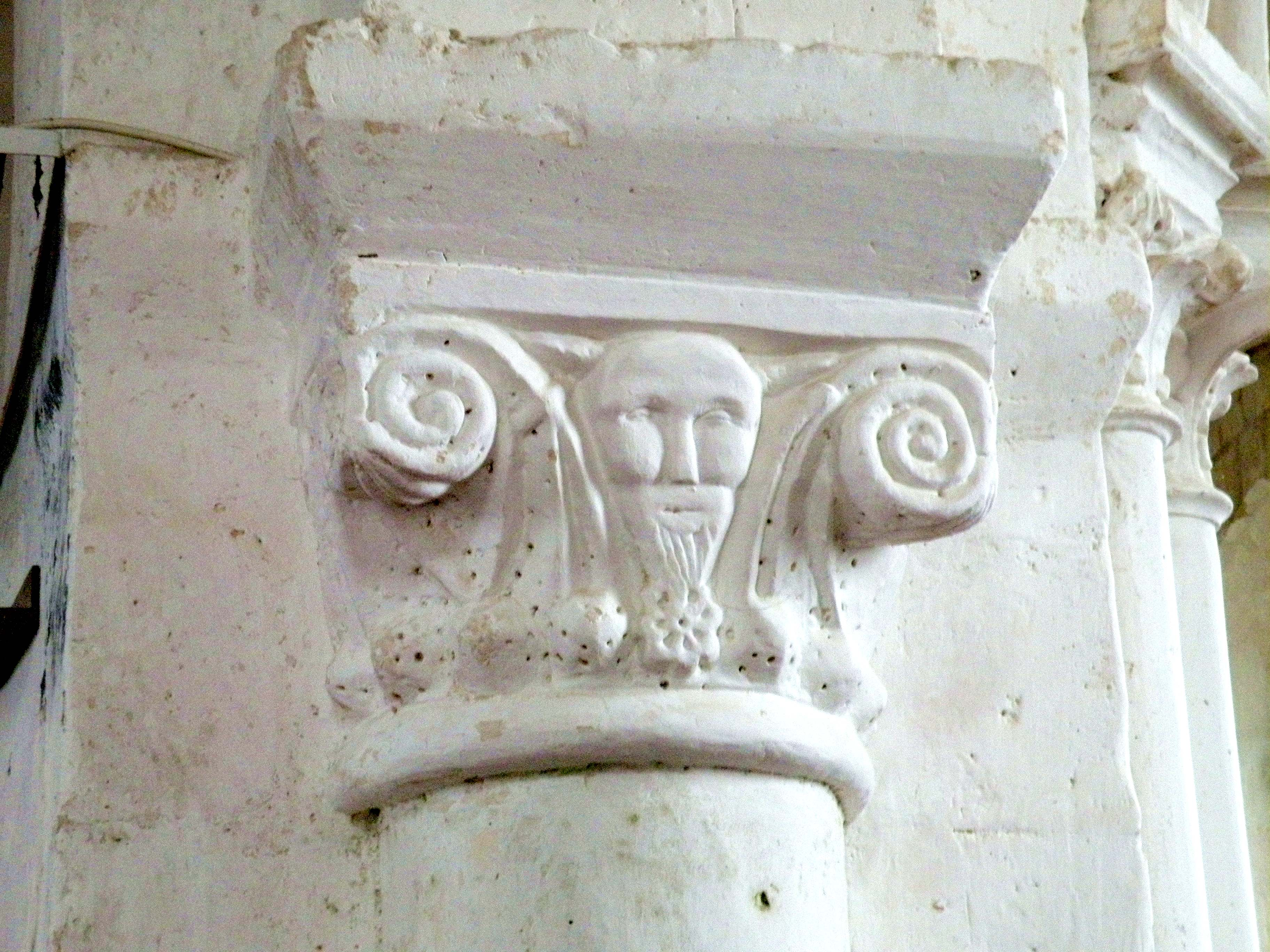 Intérieur de l'église Saint-Pierre-Saint-Paul d'Arronville